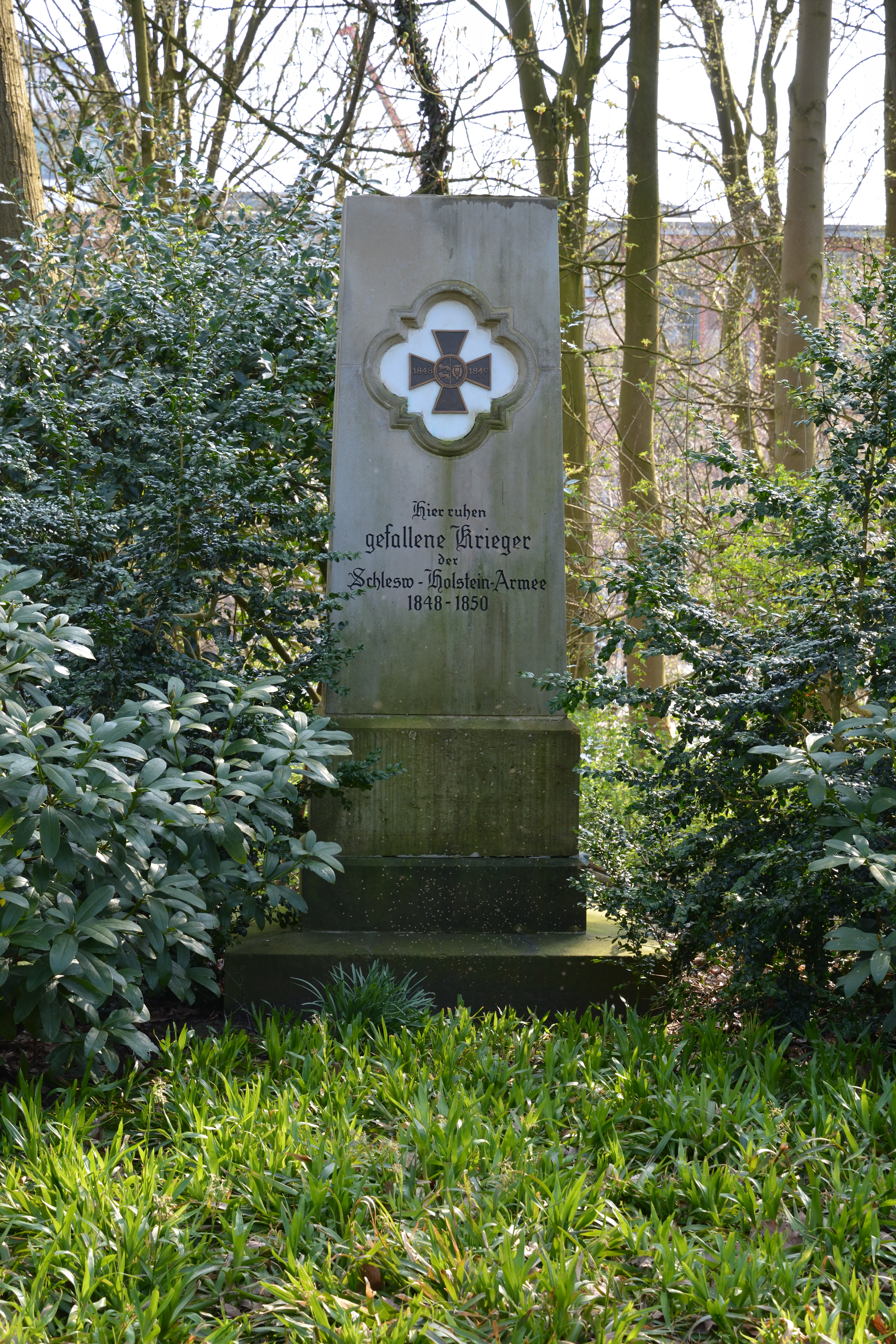 Impressionen vom Nordfriedhof in Kiel. Grab von